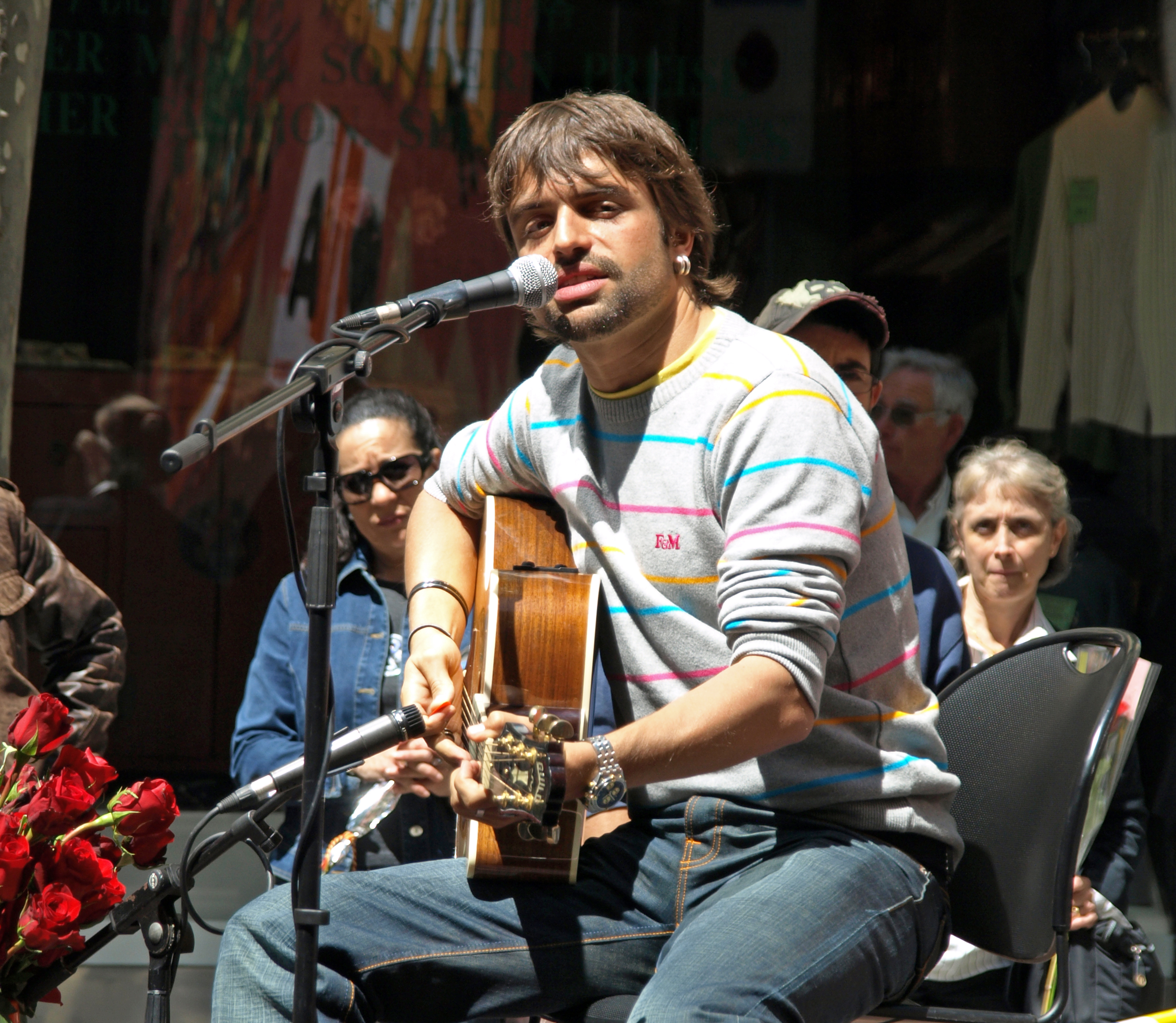 Manu Guix compositor, director musical e intérprete español.